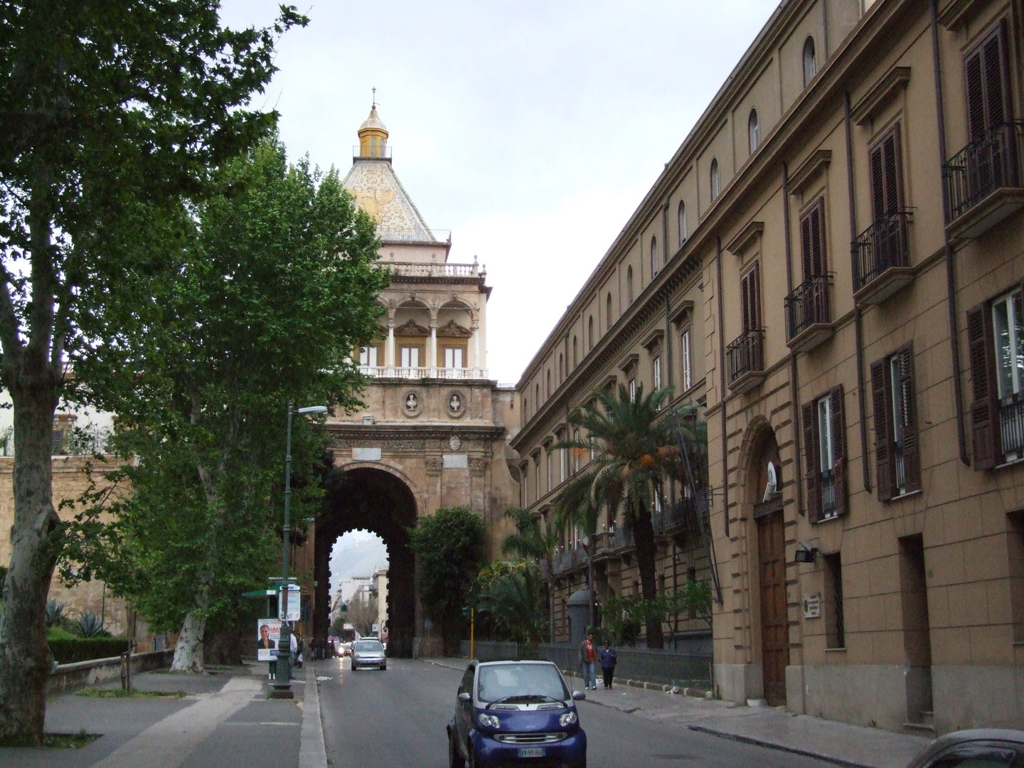 Caserme dei carabinieri "Dalla Chiesa" e "Calatafimi" (in primo piano) a Palermo